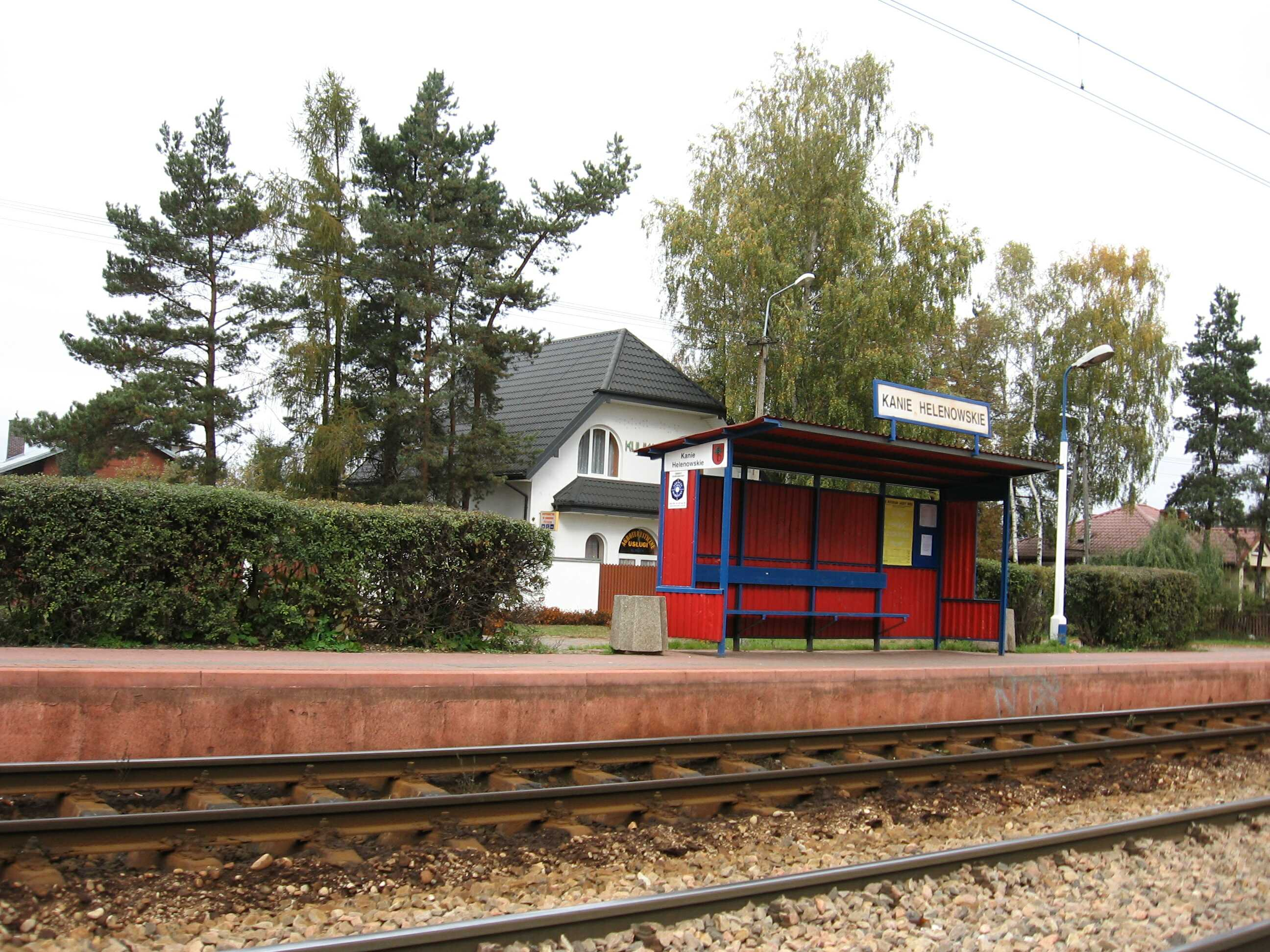 Kanie Helenowskie commuter train stop